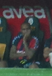 Nobre MİY formasıyla Galatasaray maçında çıktıktan sonra